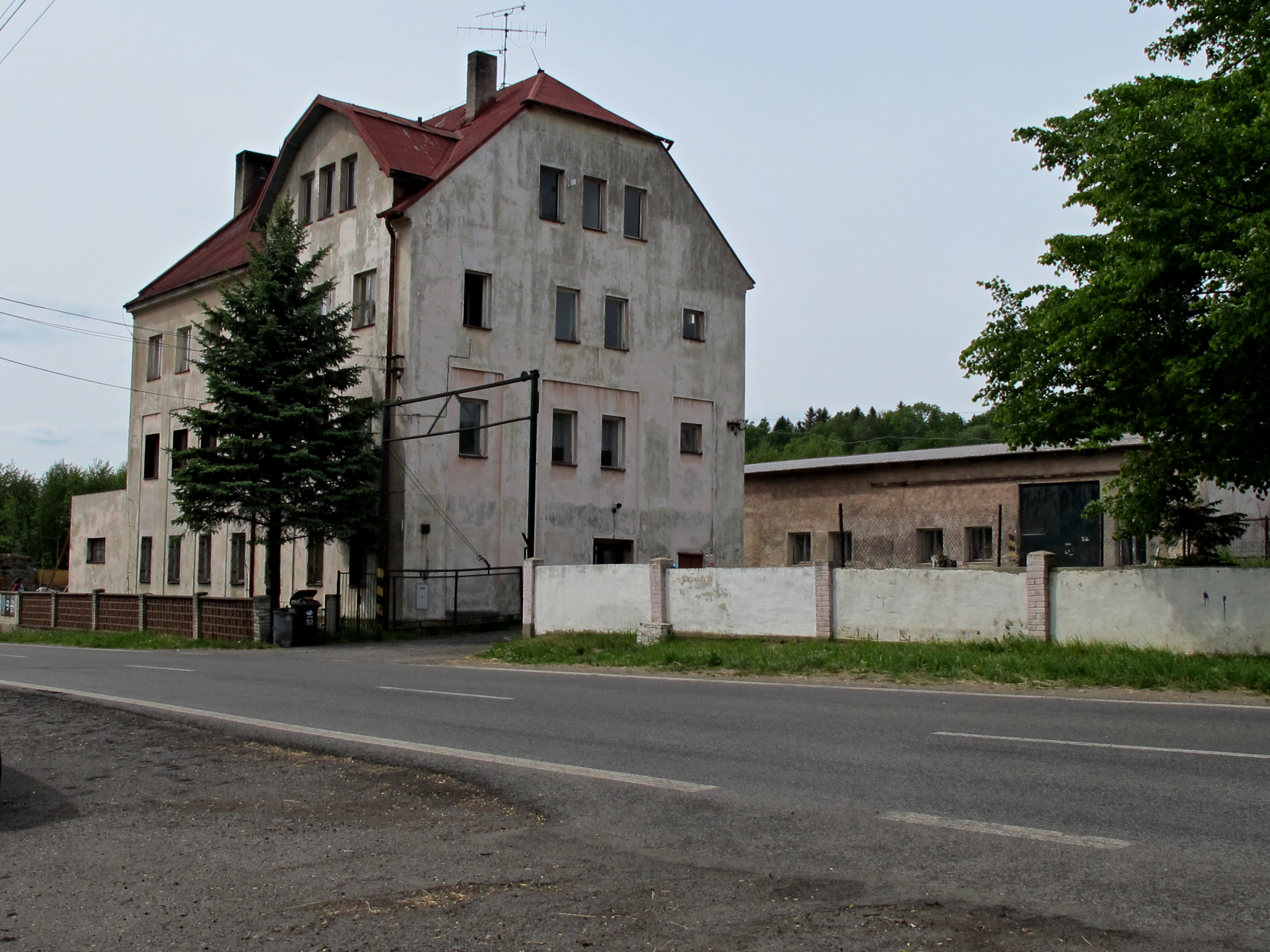 Firmengebäude der ehemaligen Porzellanfabrik Persch in Hegewald (Hajniště)